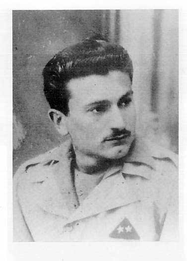 Il partigiano Alberto Cotti